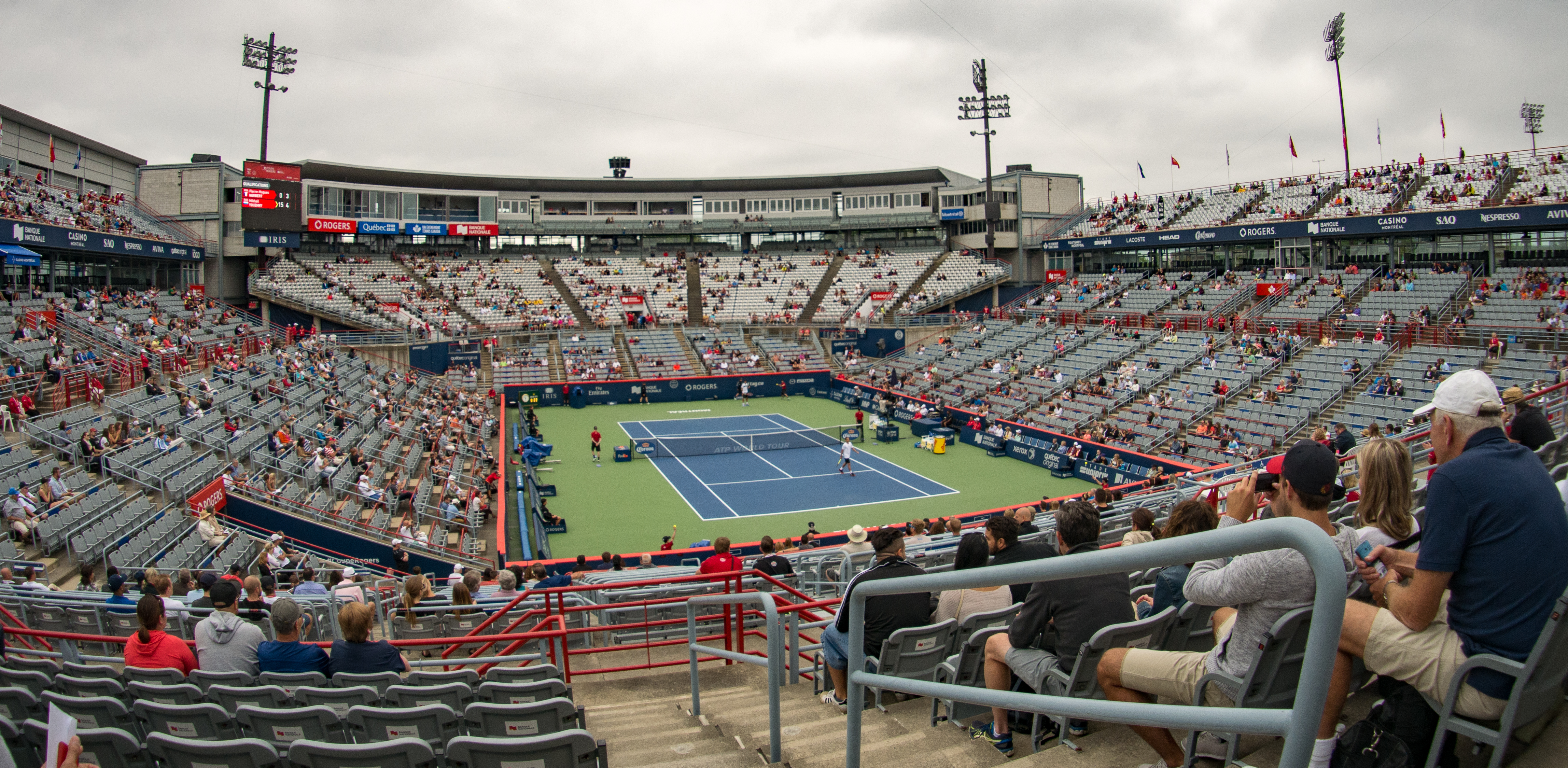 Surprenant la petit 40-150 d'Olympus !